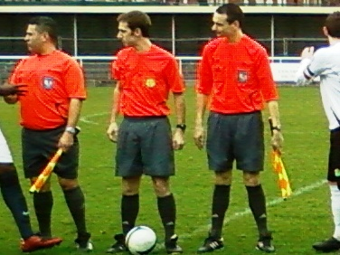 L'arbitre de football Jean-Rémi Aulu et ses deux arbitres assistants lors du match Paris FC B - Saint-Omer du 20 février 2011.